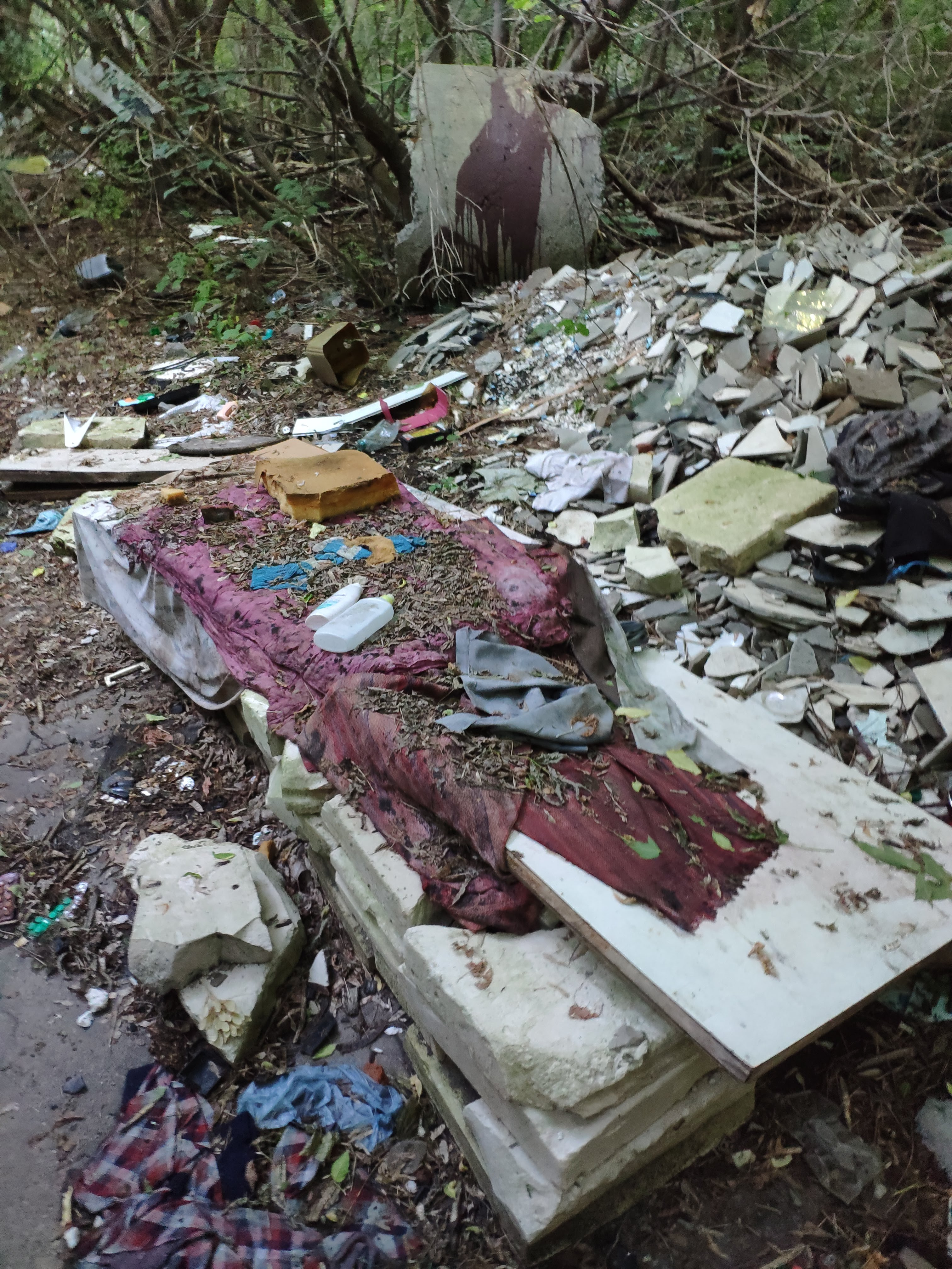 Артилерійські склади "ліжко" безхатька